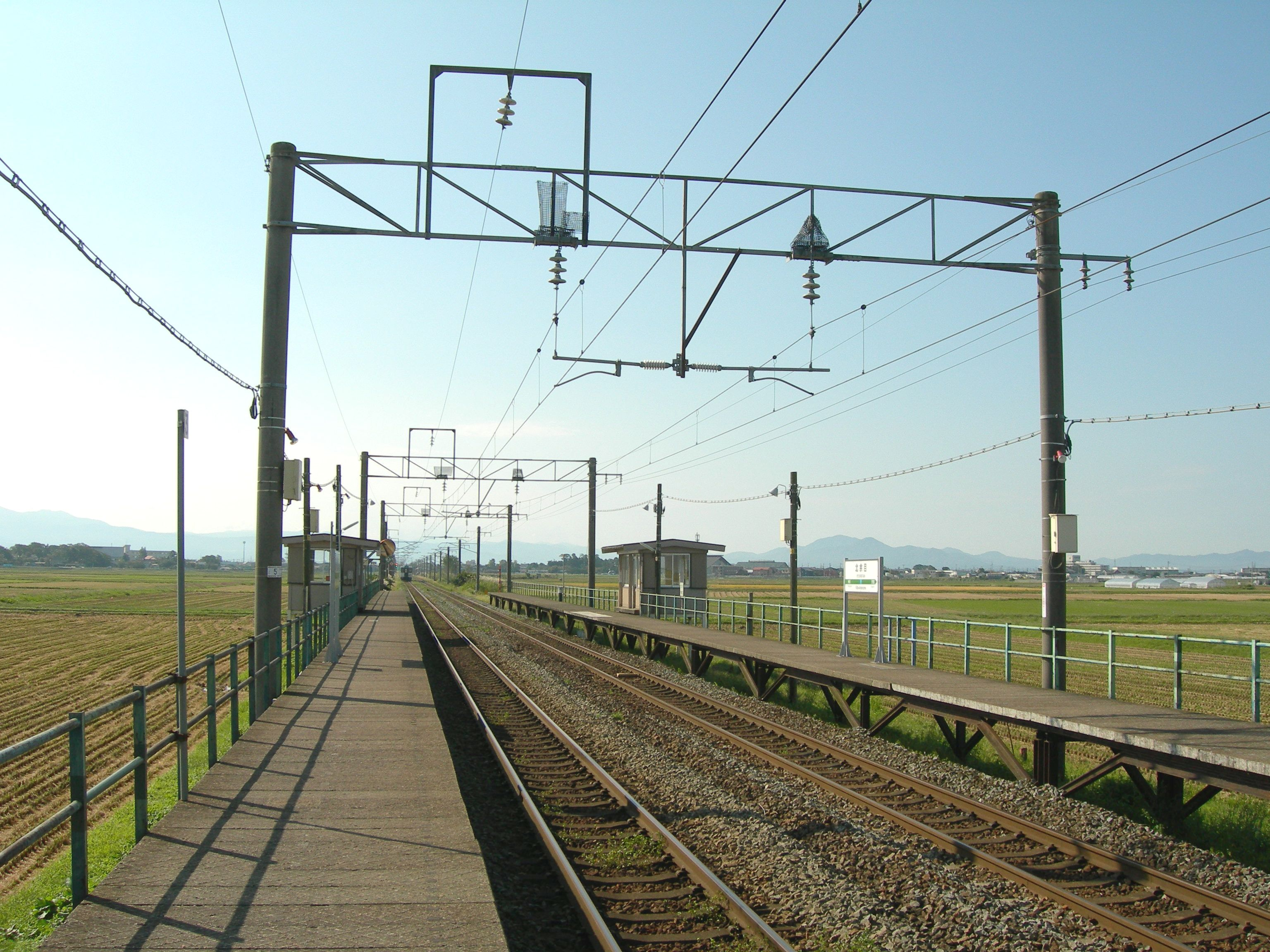 北余目駅ホーム